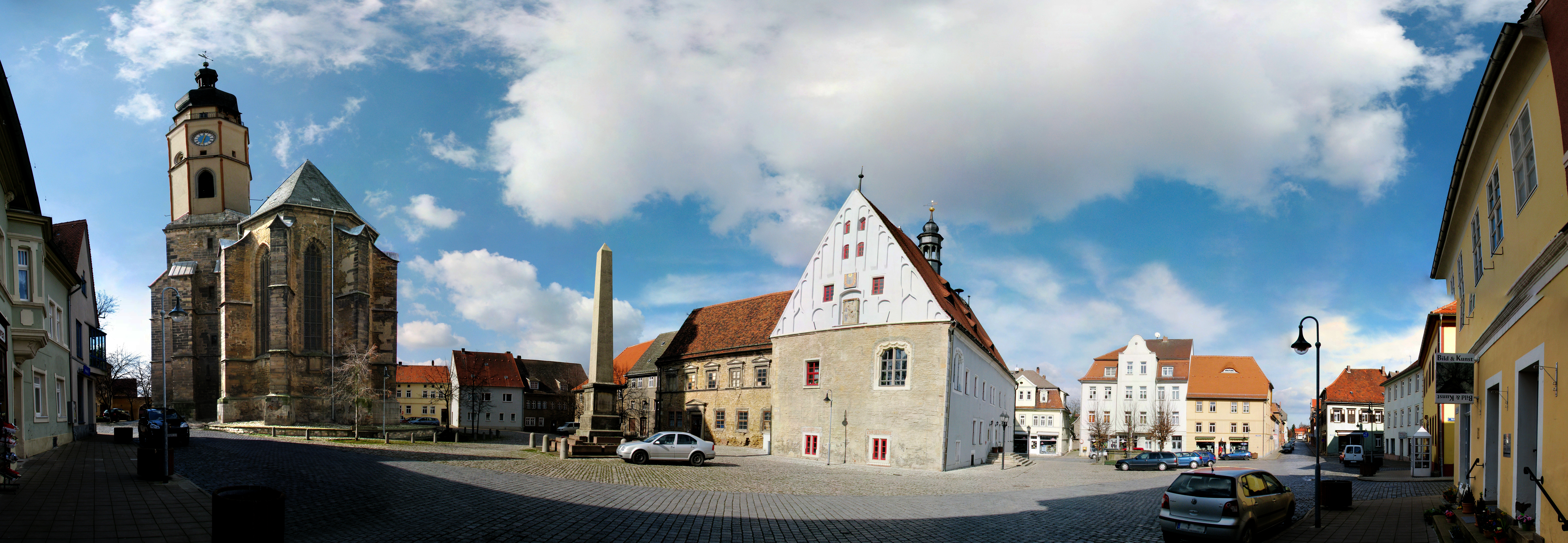 Marktplatz-Panorama Buttstädt (DE)